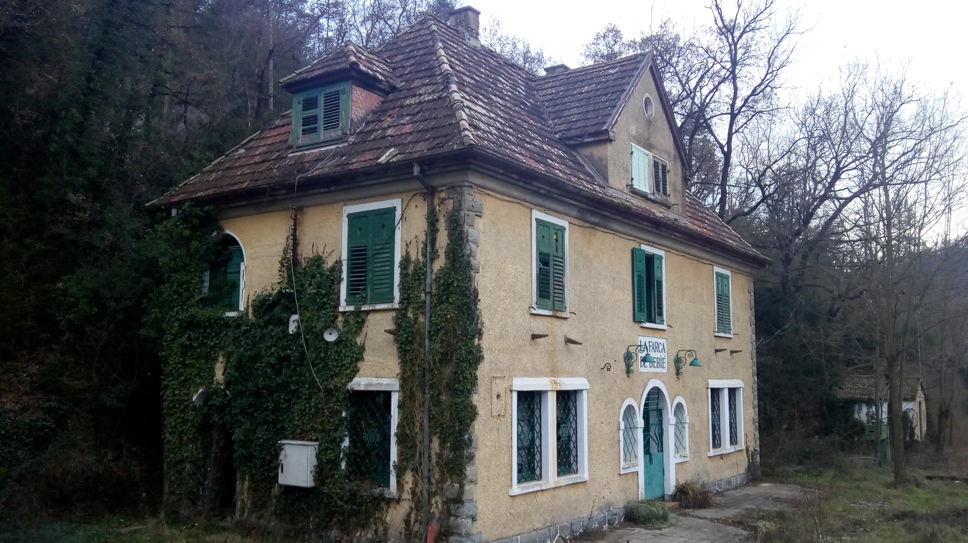 Estación de La Farga de Bebié